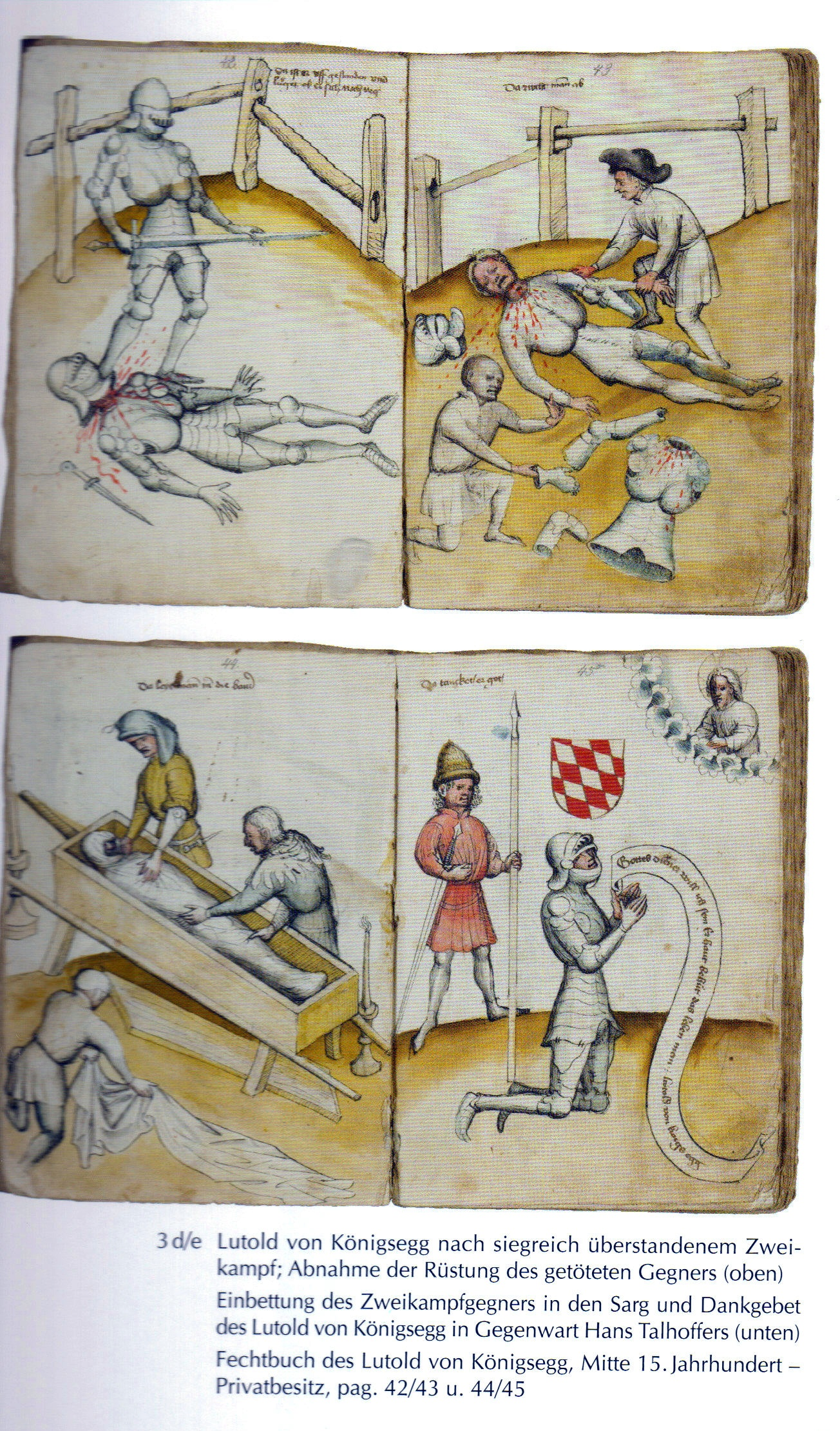 Der Königsegger Kodex, Hs. XIX 17-3, Schlossbibliothek Königseggwald